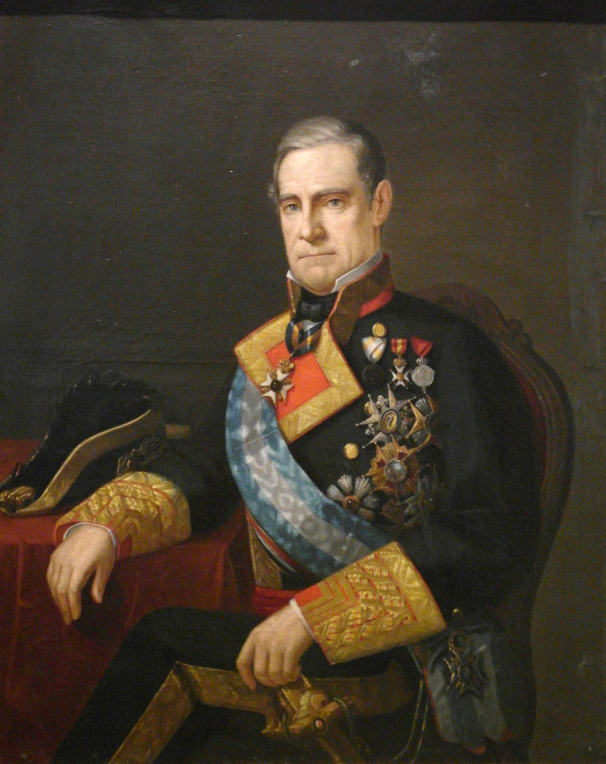 Retrato del marino español José María de Bustillo Gómez de Barreda (c. 1803-1868), que fue capitán general de la Armada española.